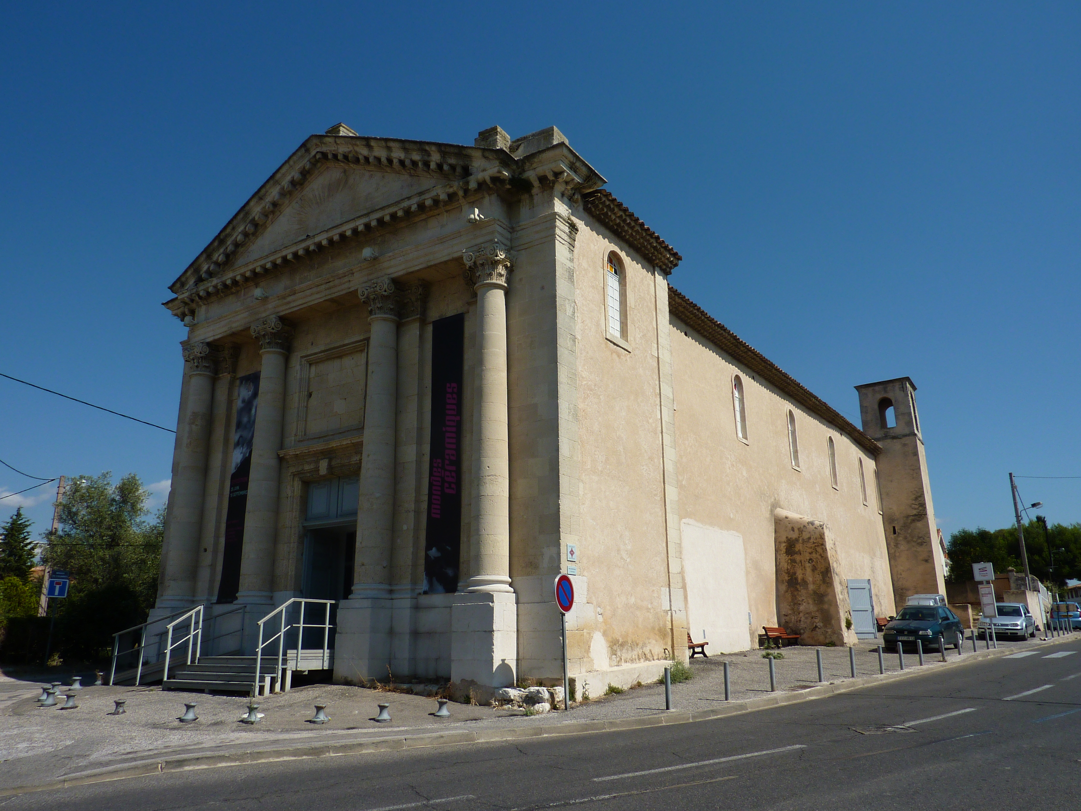 Chapelle des pénitents noirs (Aubagne, Bouches-du-Rhône, France) .